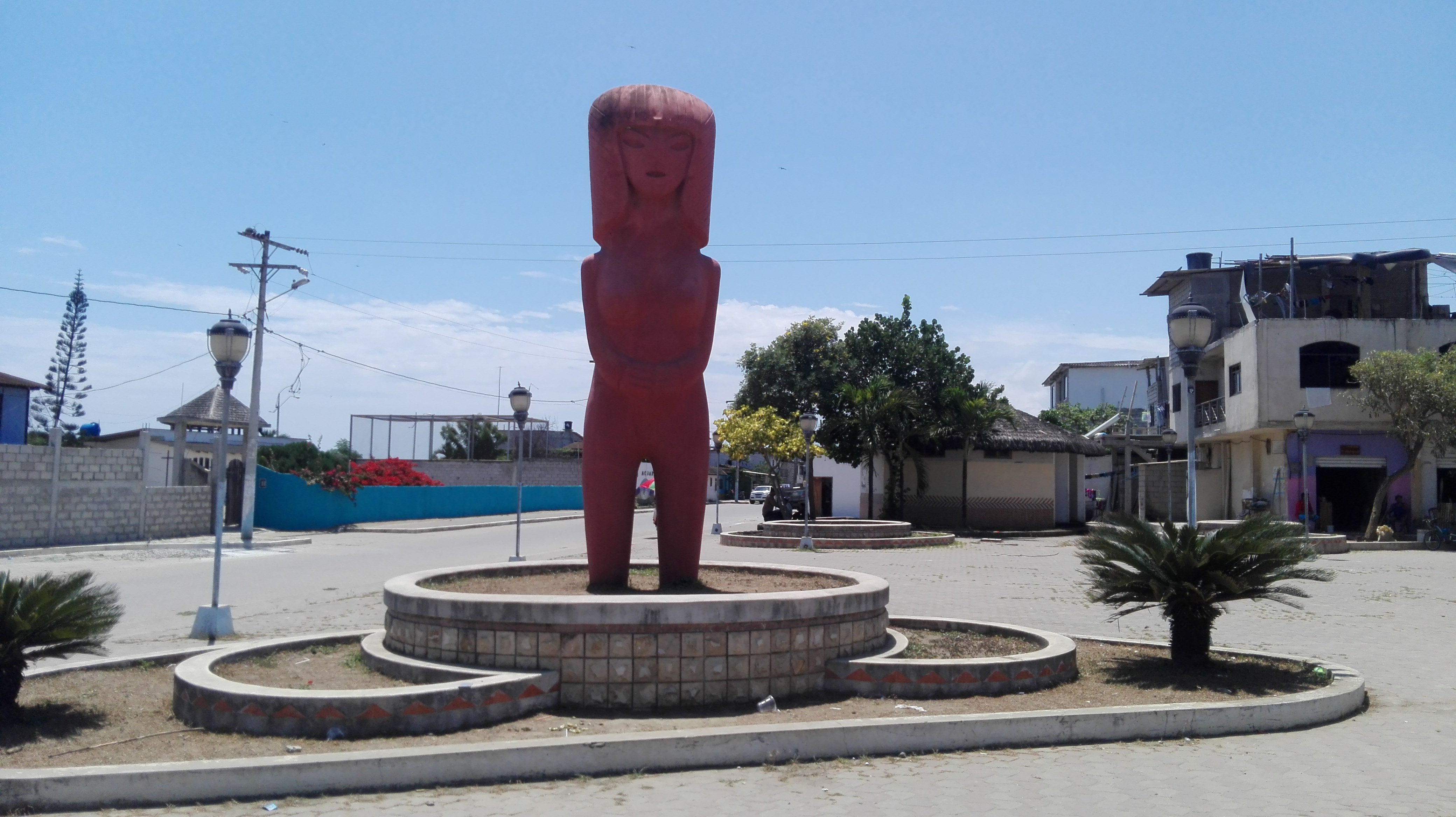 Monumento a la cutura Valdivia representada por la Venus de Valdivia, imagen emblema de la localidad